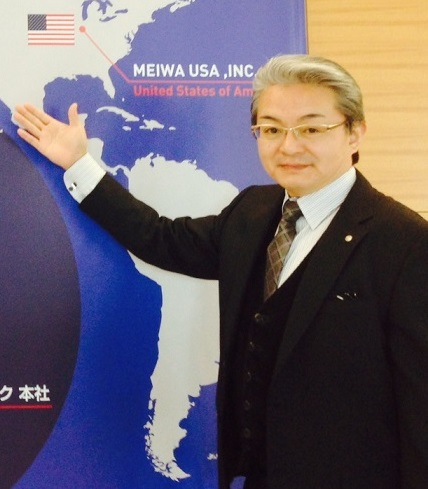 明和eテック & 先端技術産業振興プラザ 理事